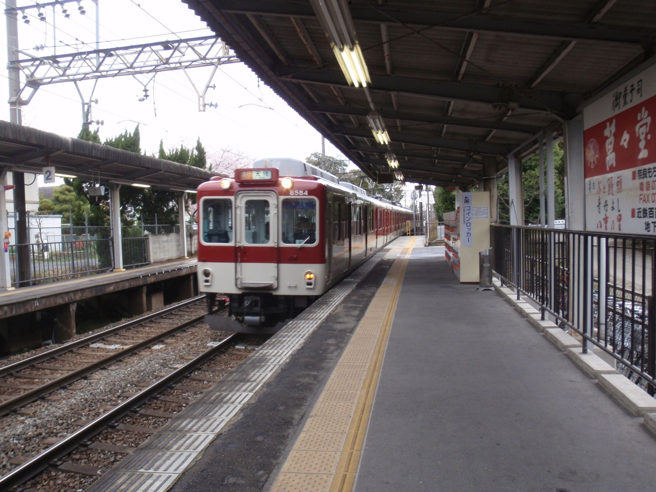 Kintetsu-Koriyama Station